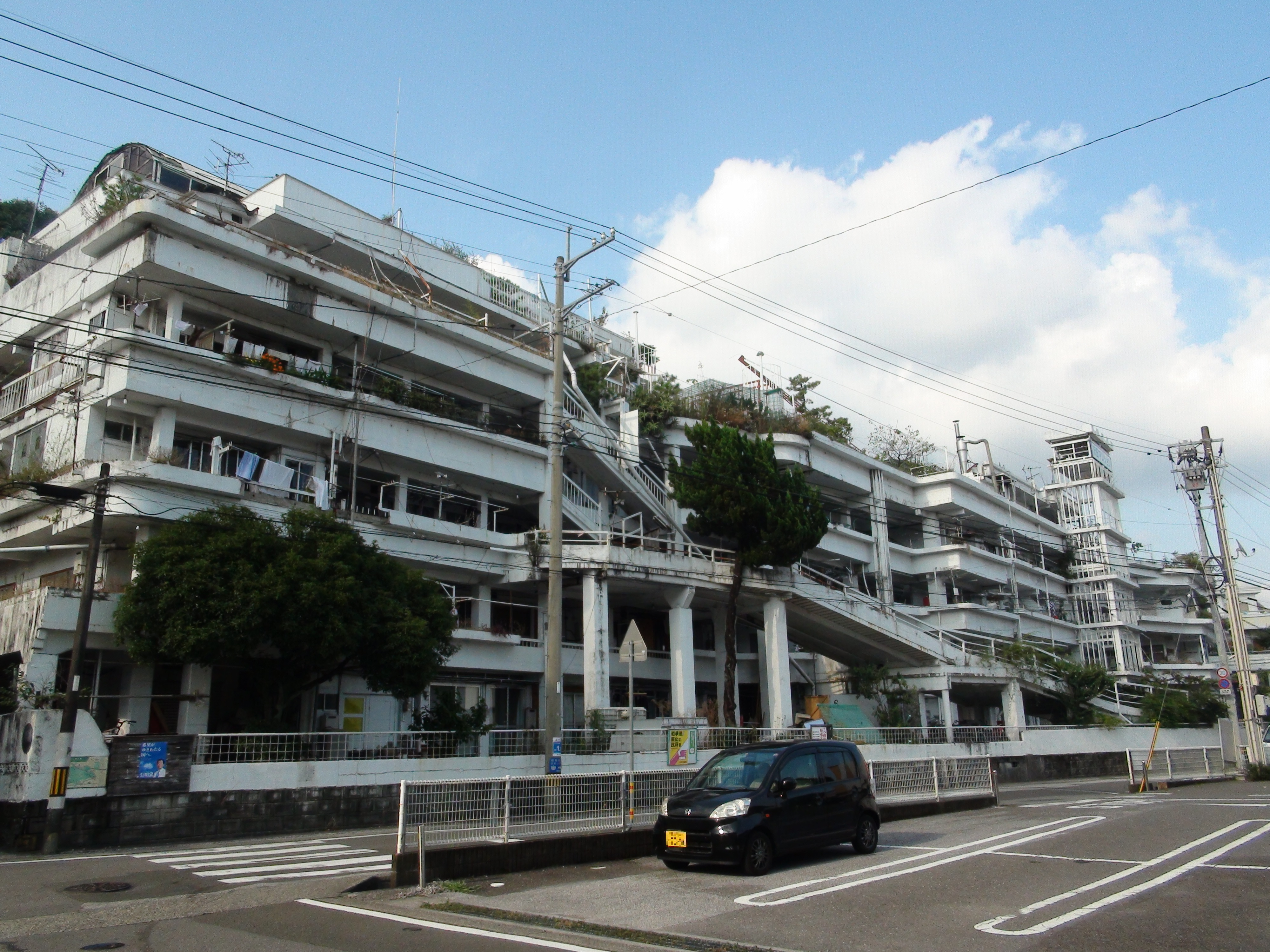 高知市の沢田マンション（南西側より撮影）